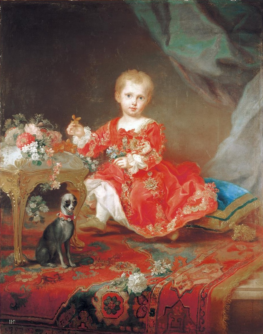 Portrait of Infante Felipe Pascual